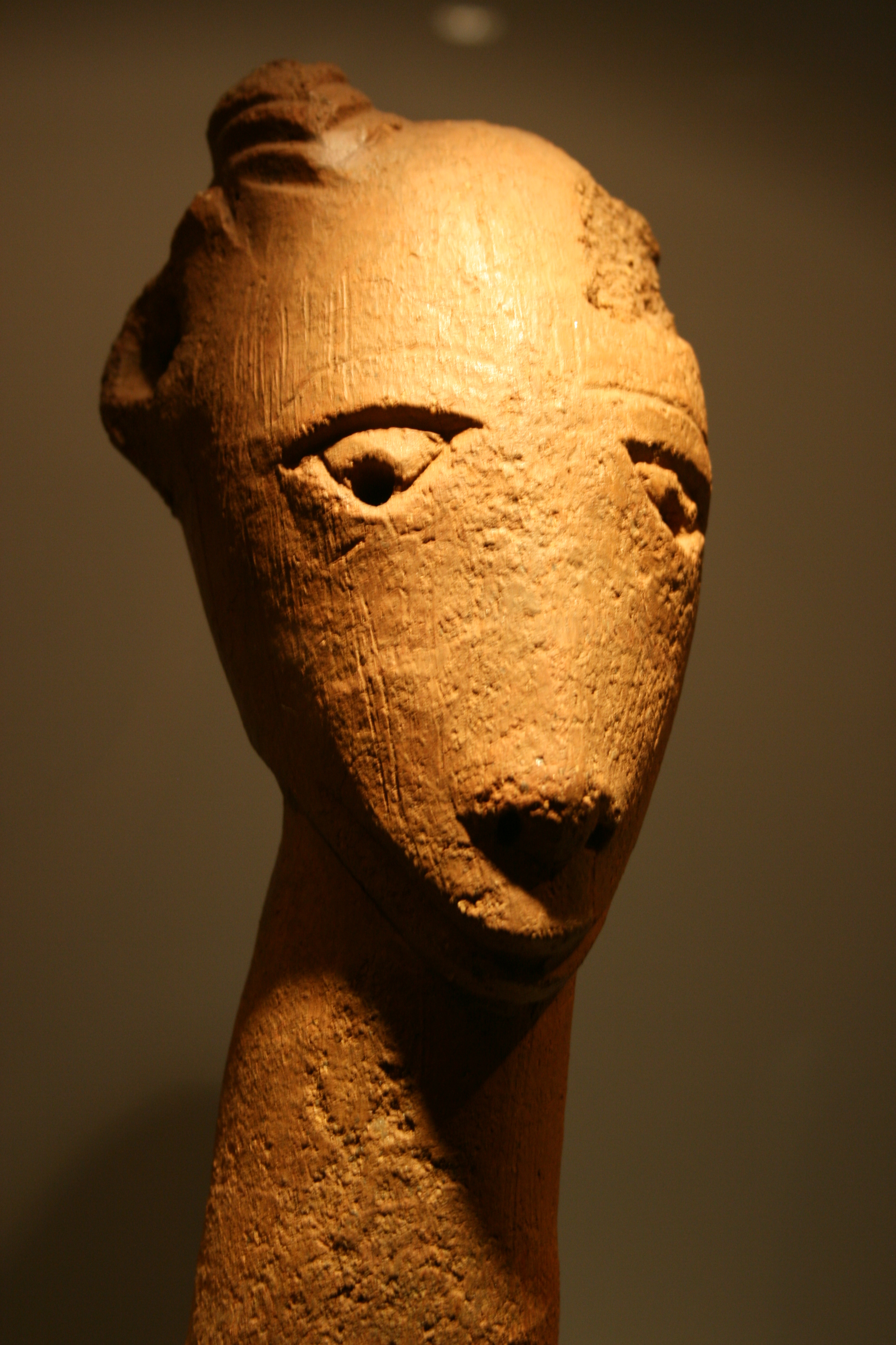 Cultura Nok, procedencia Nigeria. Siglo V a. C. - V d. C. Altura 55 cm. El rostro tiene una sonrisa casi humana, así como los ojos y nariz, representados de la forma típica de las representaciones humanas.